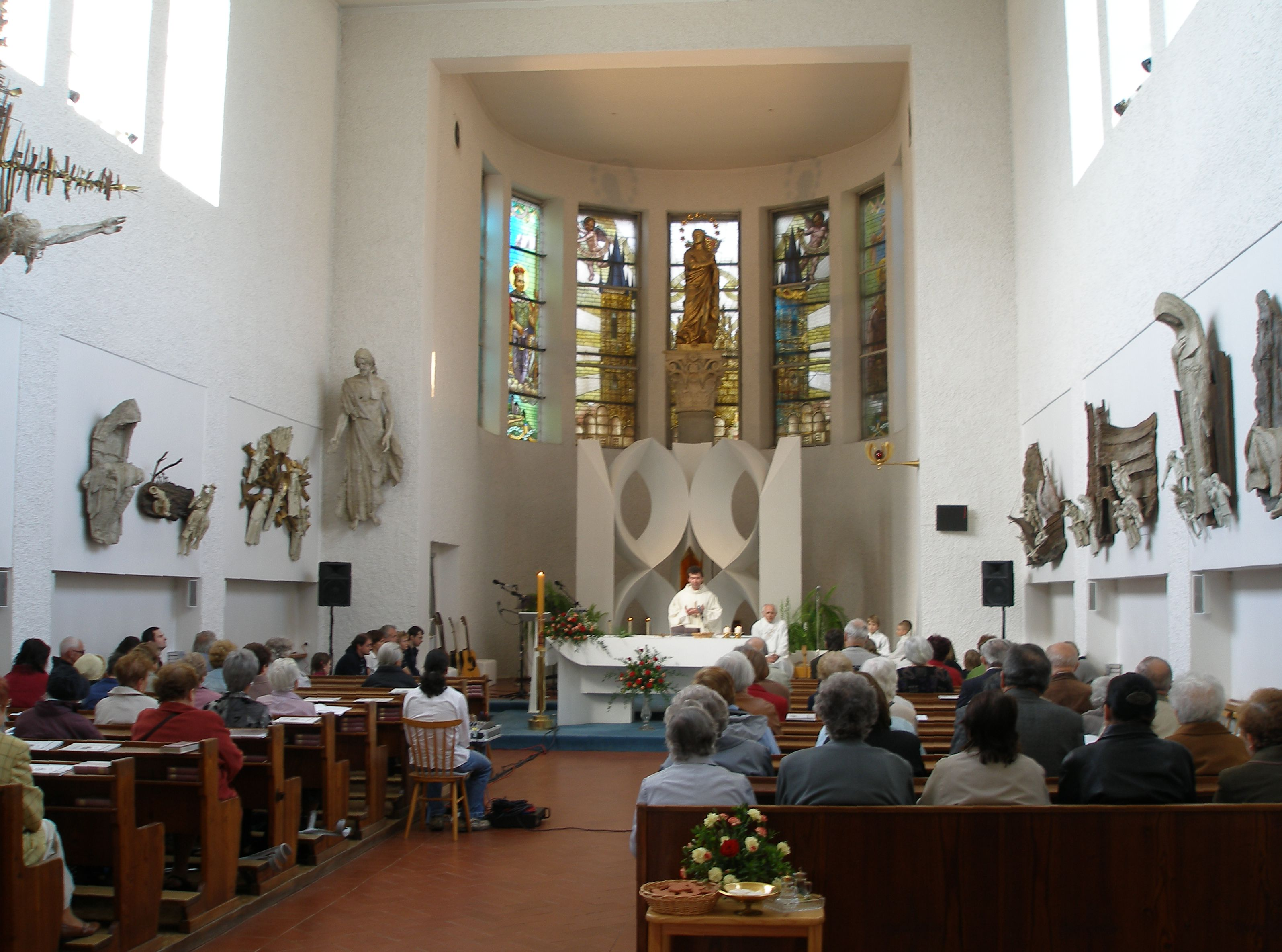 Interiér kostela na Lhotce v Praze s oltářem a křížovou cestou od Karla Stádníka